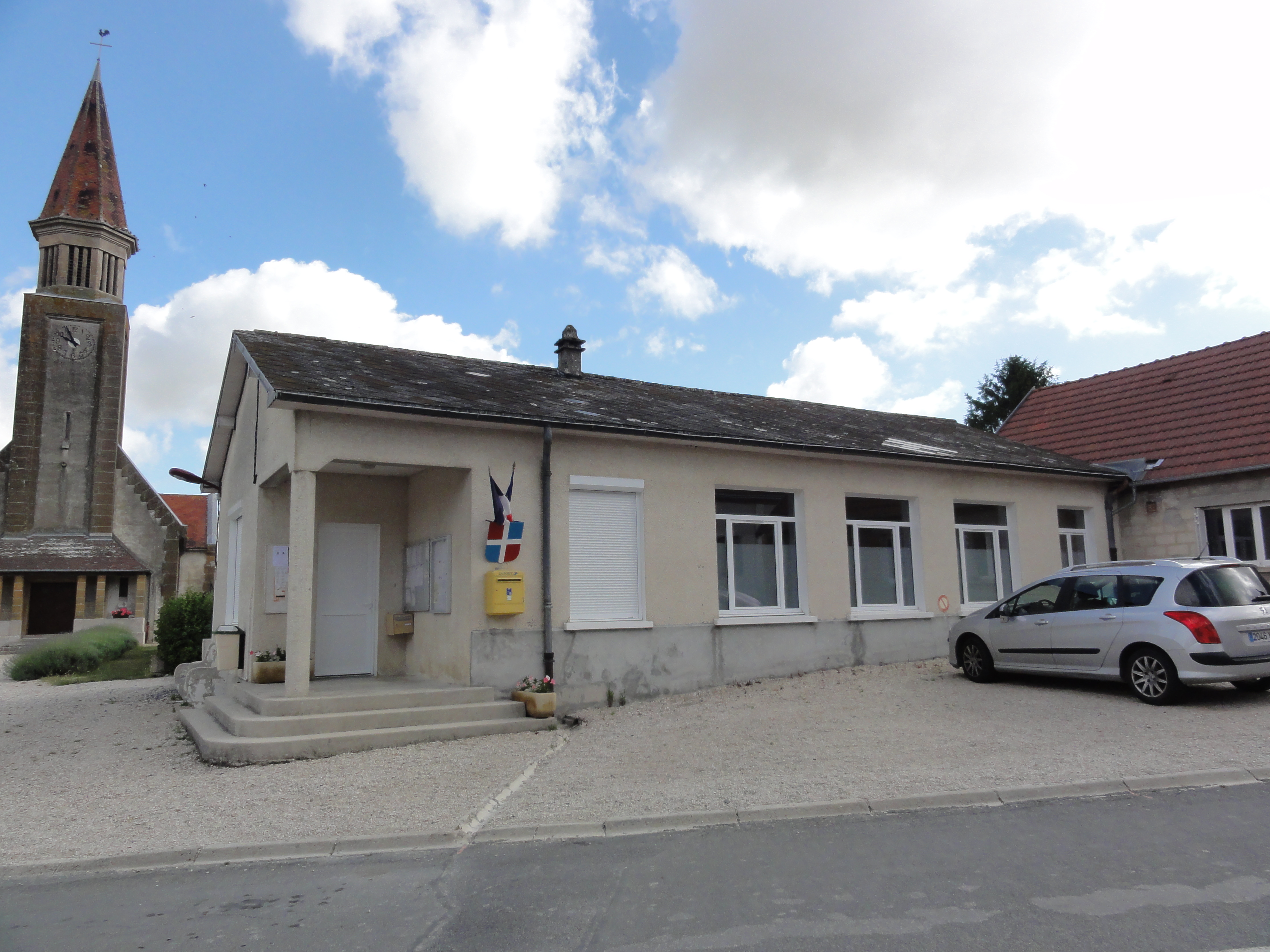 Proviseux-et-Plesnoy (Aisne) mairie-école et la tour de l'église